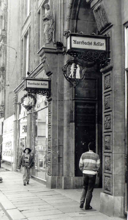 Leipzig, gatubild våren 1996... en bild tagen av Harri Blomberg. Auerbachs Keller, numera i Mädler-Passagen, besöktes ofta av Goethe i början av 1800-talet.